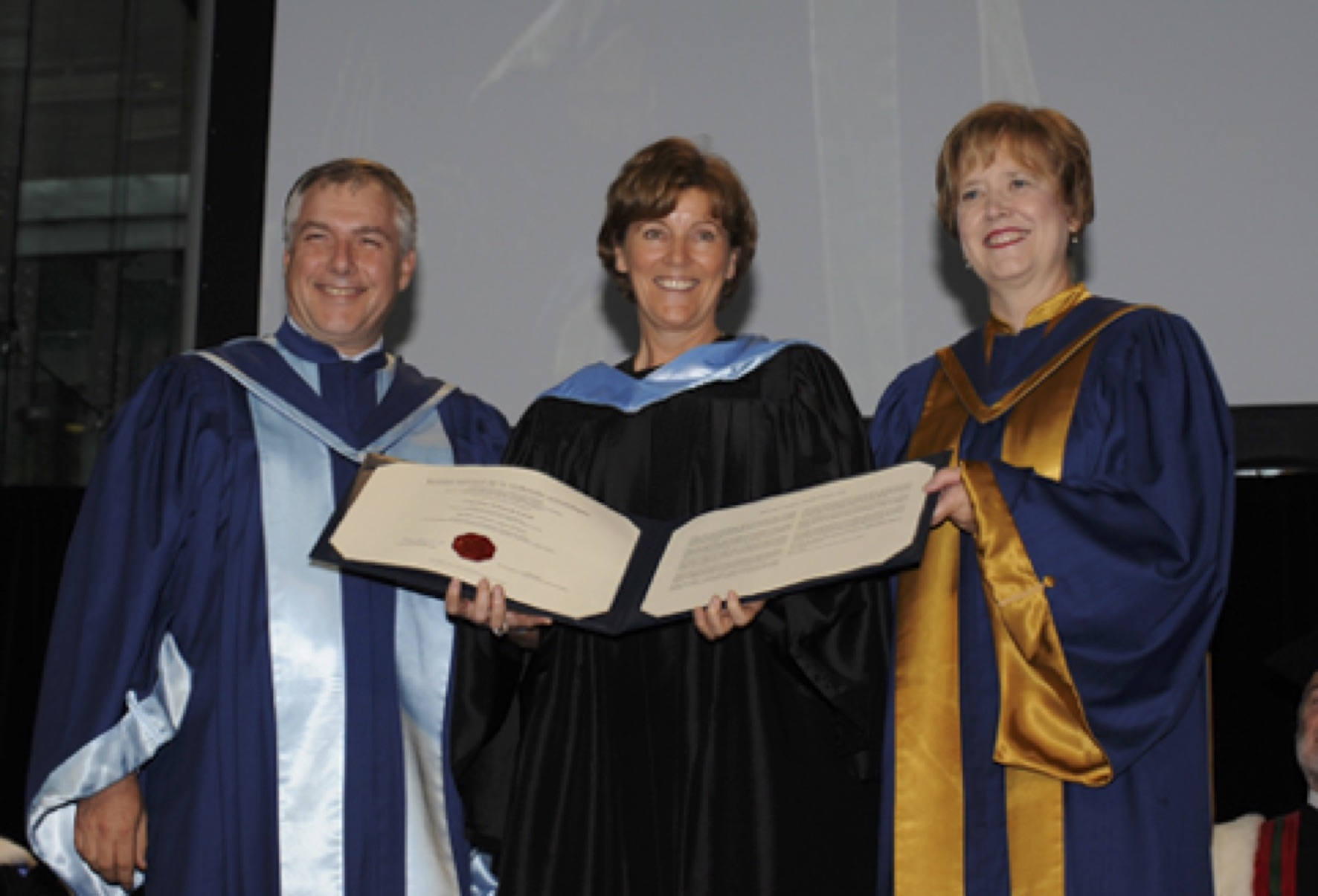 cérémonie dhc